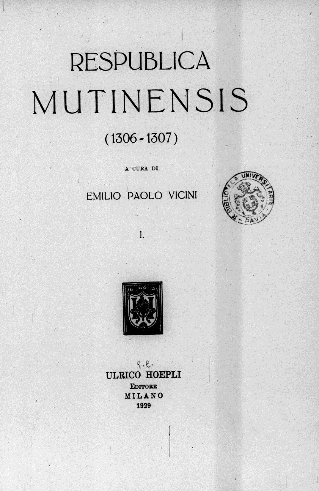 Frontespizio